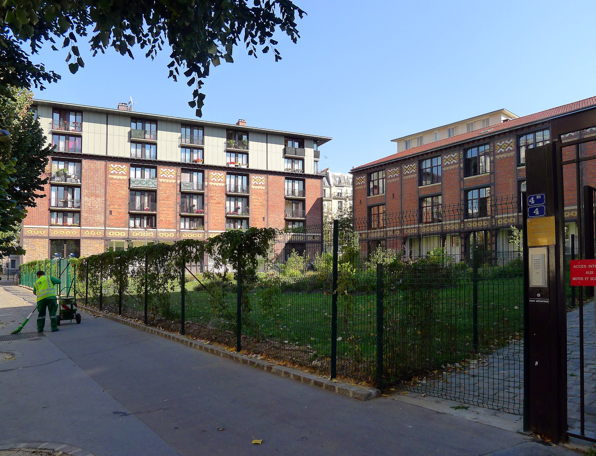 Rue Schomberg (anciens batiments de la caserne de la garde républicaine MH) - Paris IV .